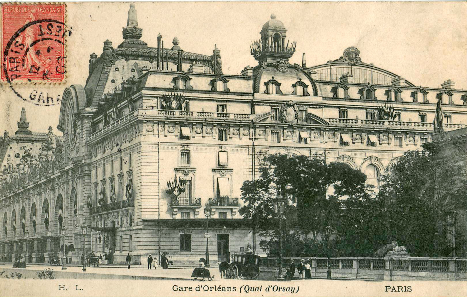 Carte postale ancienne éditée par H. L. : PARIS - Gare d'Orléans (Quai d'Orsay)